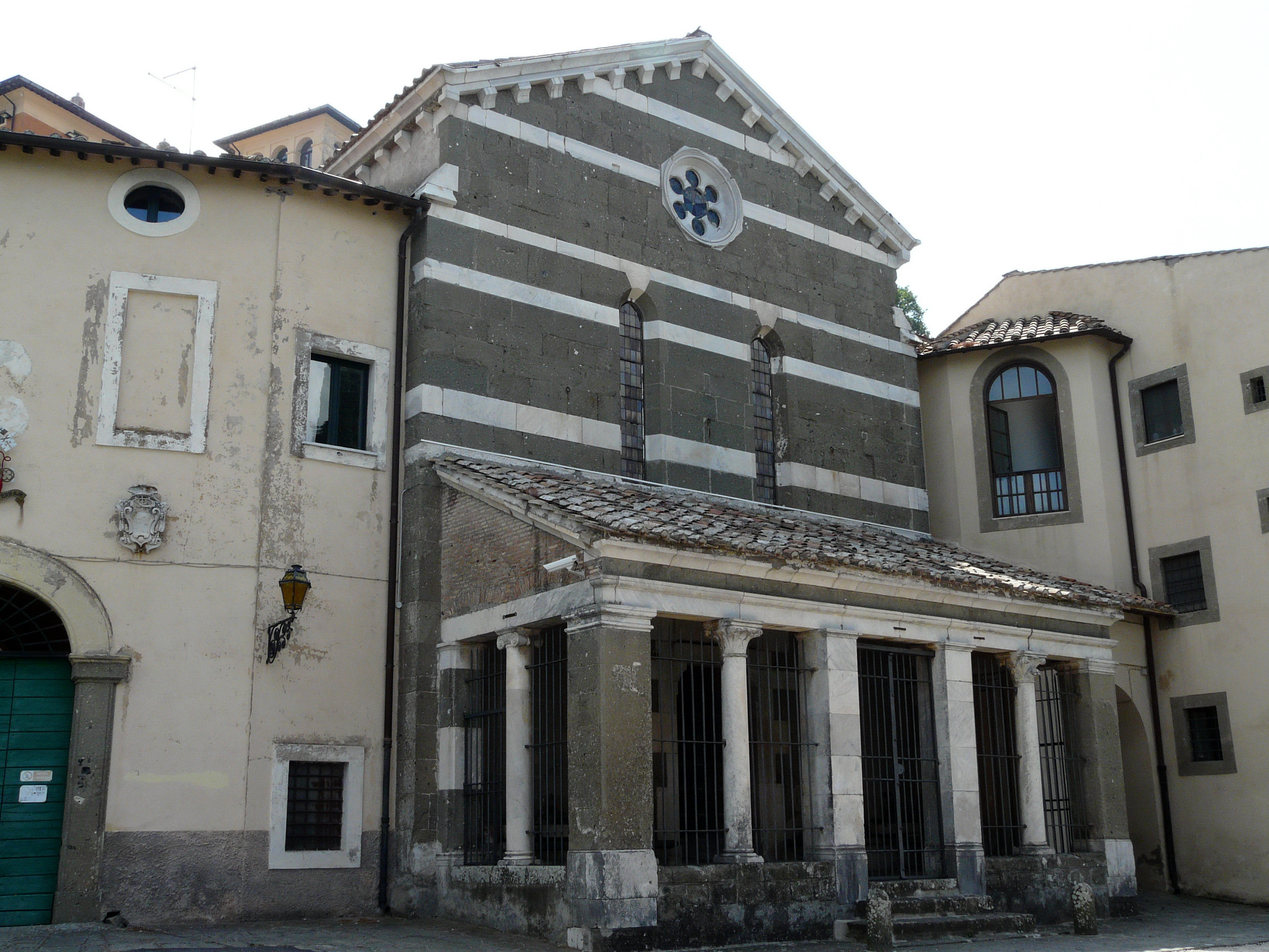 Convento di Santa Maria ad Nives - Palazzolo - Rocca di Papa (Rm)